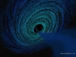 Mayor agujero negro descubierto (ubicación: Galaxia IC10)